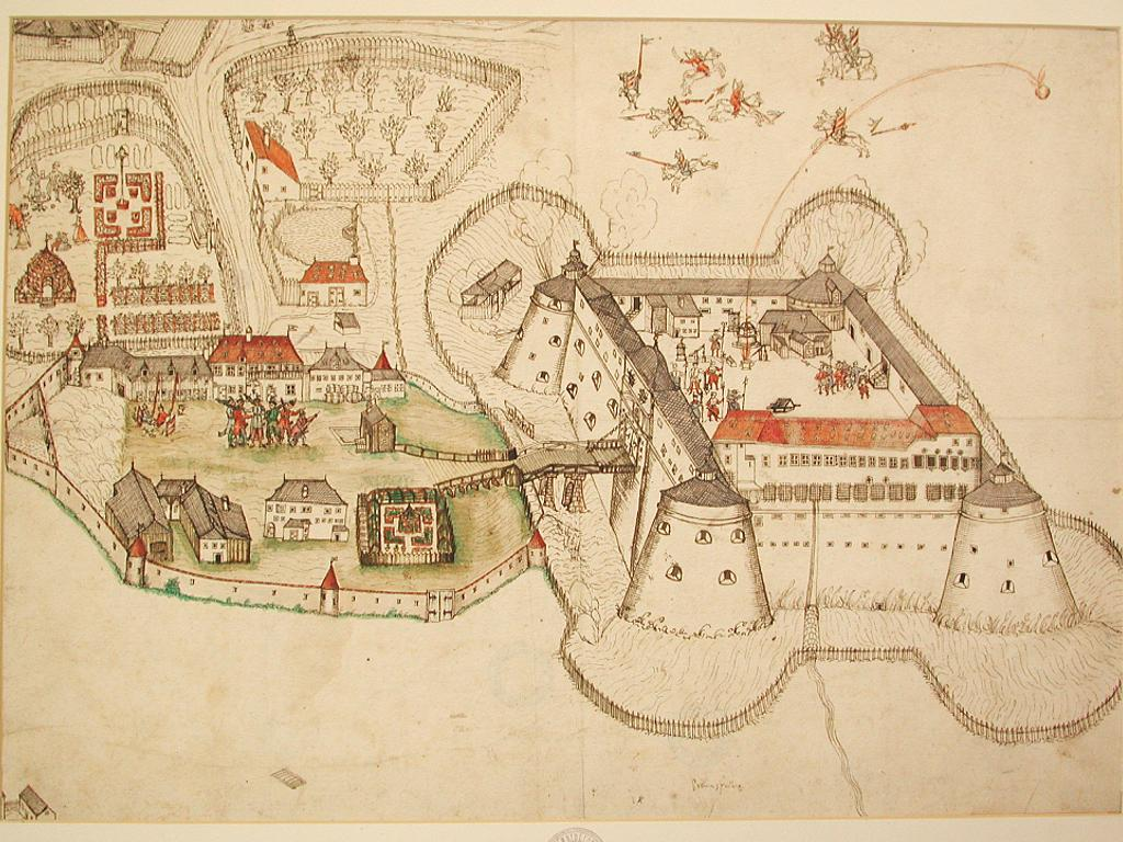 Schloss Pibersburg (Červený Kameň), kolorierte Federzeichnung, um 1570